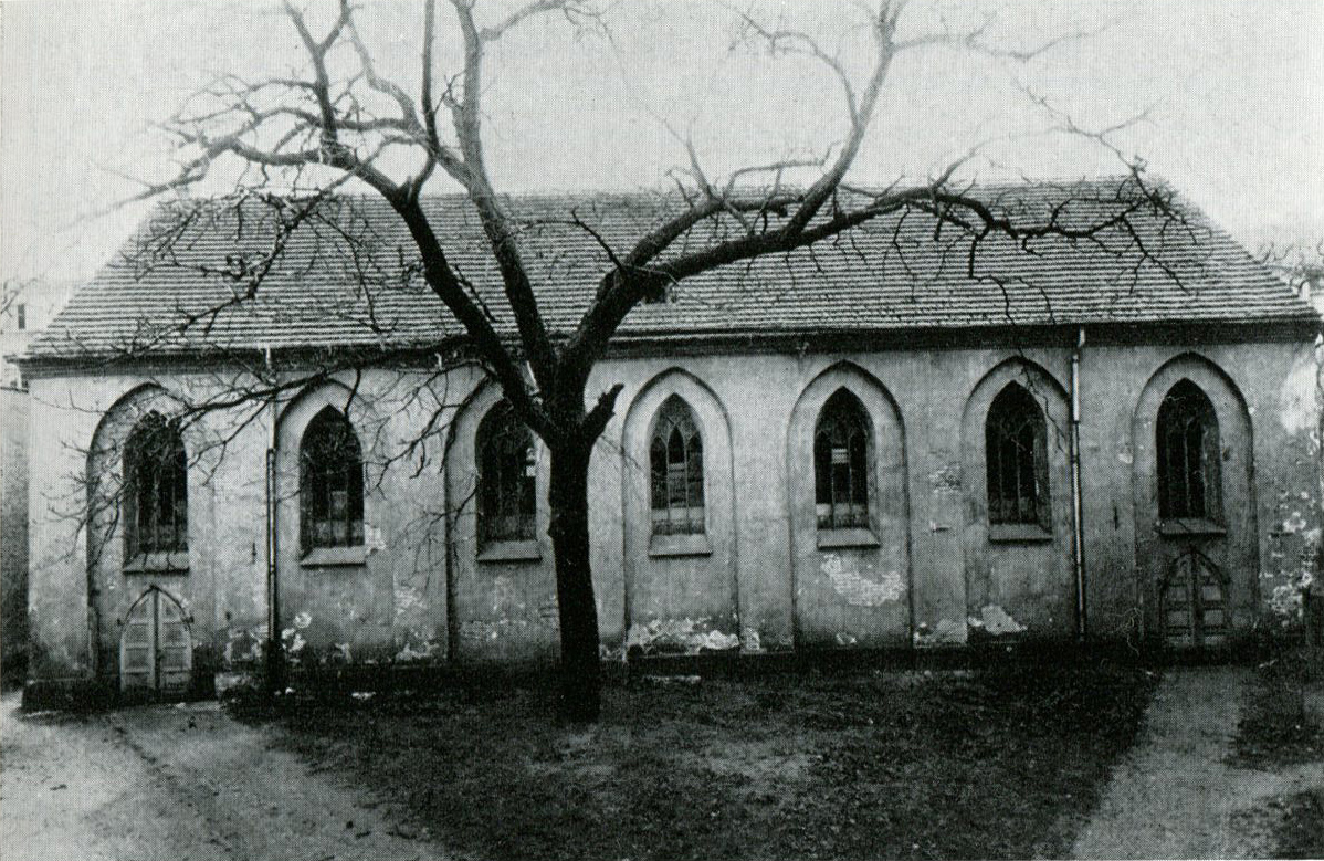 Johanneskirche (Berlin-Spandau), Ansicht von Osten